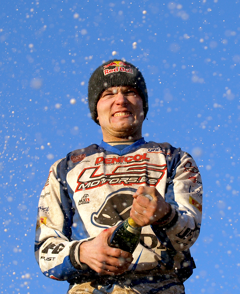 Estonian motocross racer Tanel Leok.